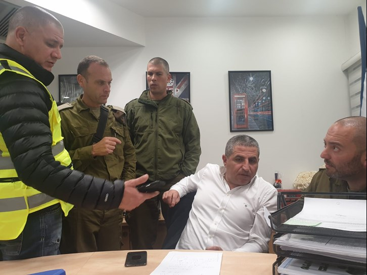 כוחות צה"ל פועלים לסיוע בחילוץ אזרחים באזורי ההצפות בצפון הארץ. כוחות צה"ל מעוצבת "הגליל", לוחמי קומנדו, שריון, הנדסה, תותחנים, חי"ר וזרוע הים, הוקפצו לסיוע באירועי ההצפות.